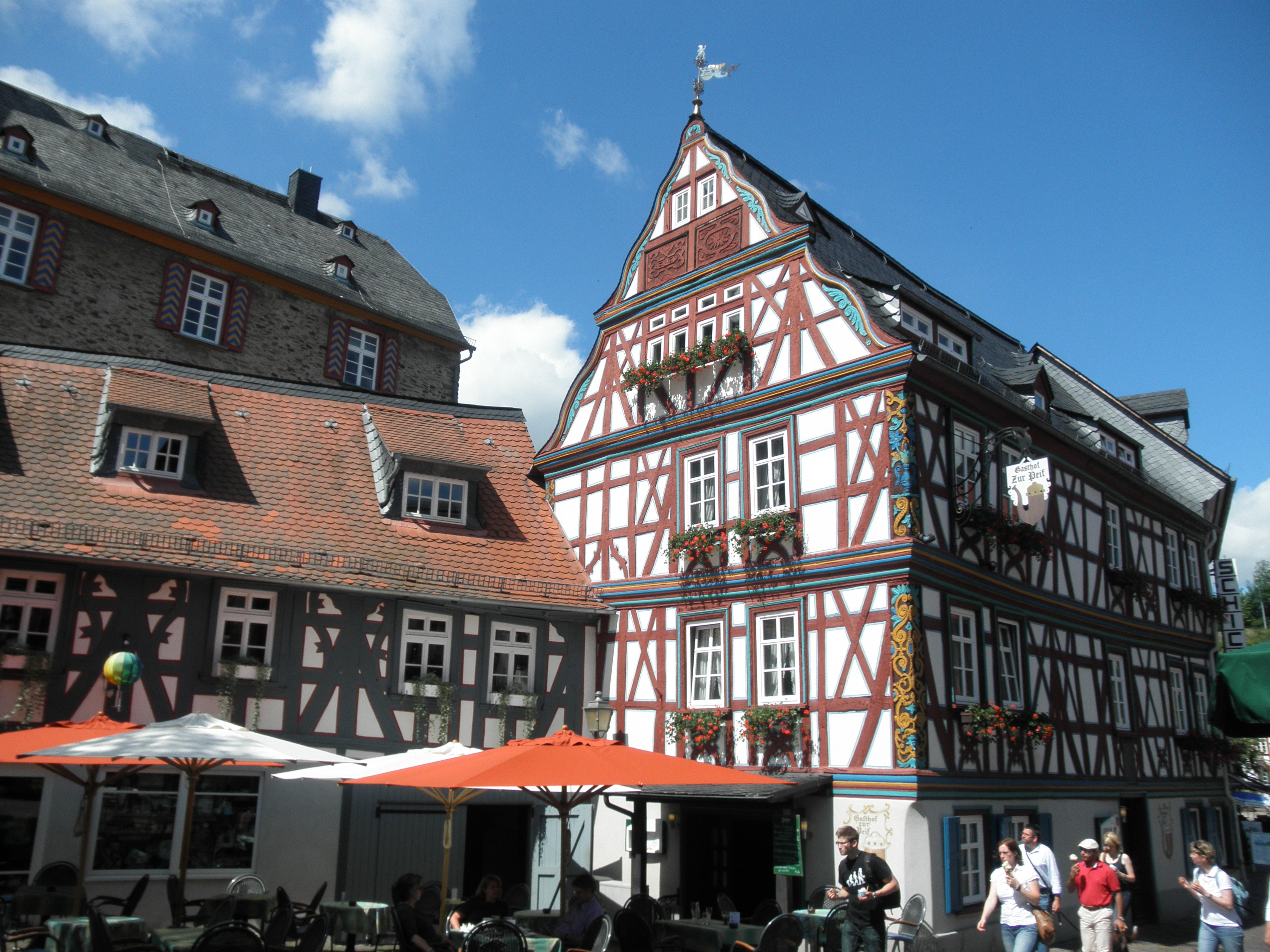 am König-Adolf-Platz Idstein (links Haus 4, rechts Haus Himmelsgasse 2)